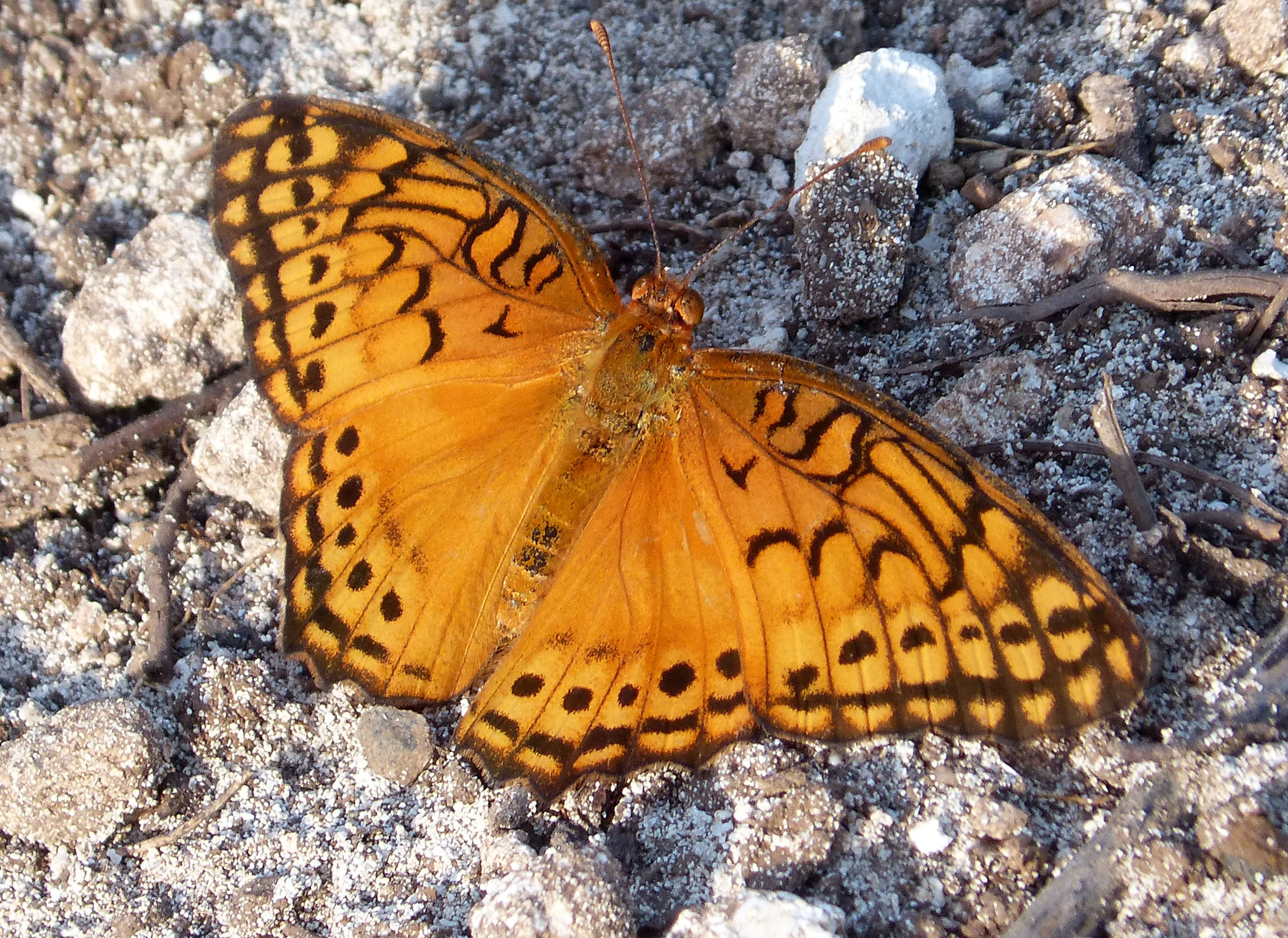 Cayo Coco, Cuba